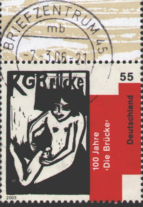 марка